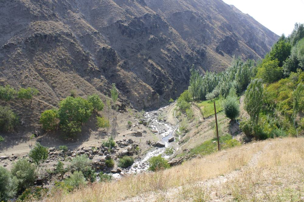 Сукоксай, сентябрь 2013 года